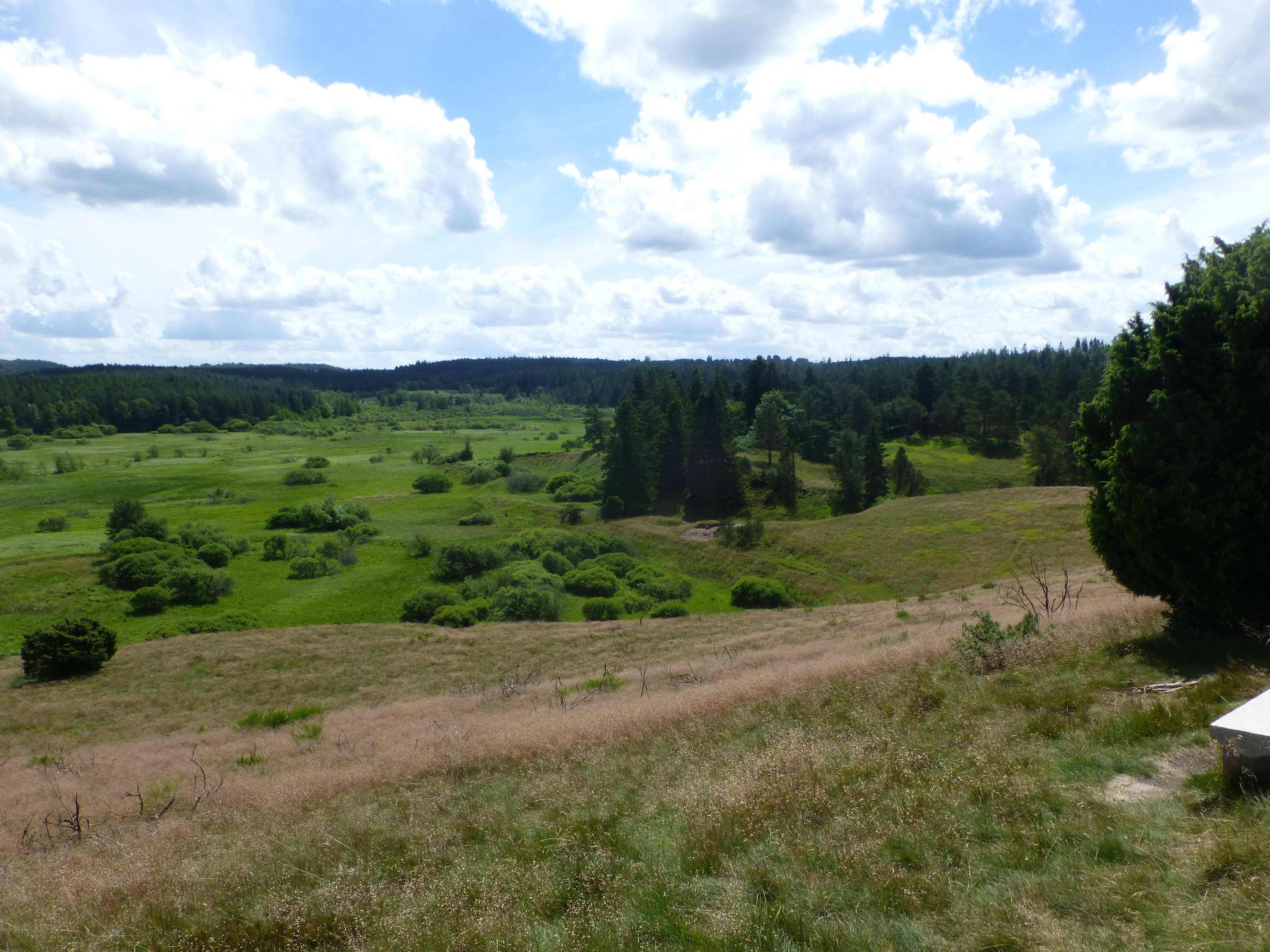 Ansø Enge set fra Blæsbjerge